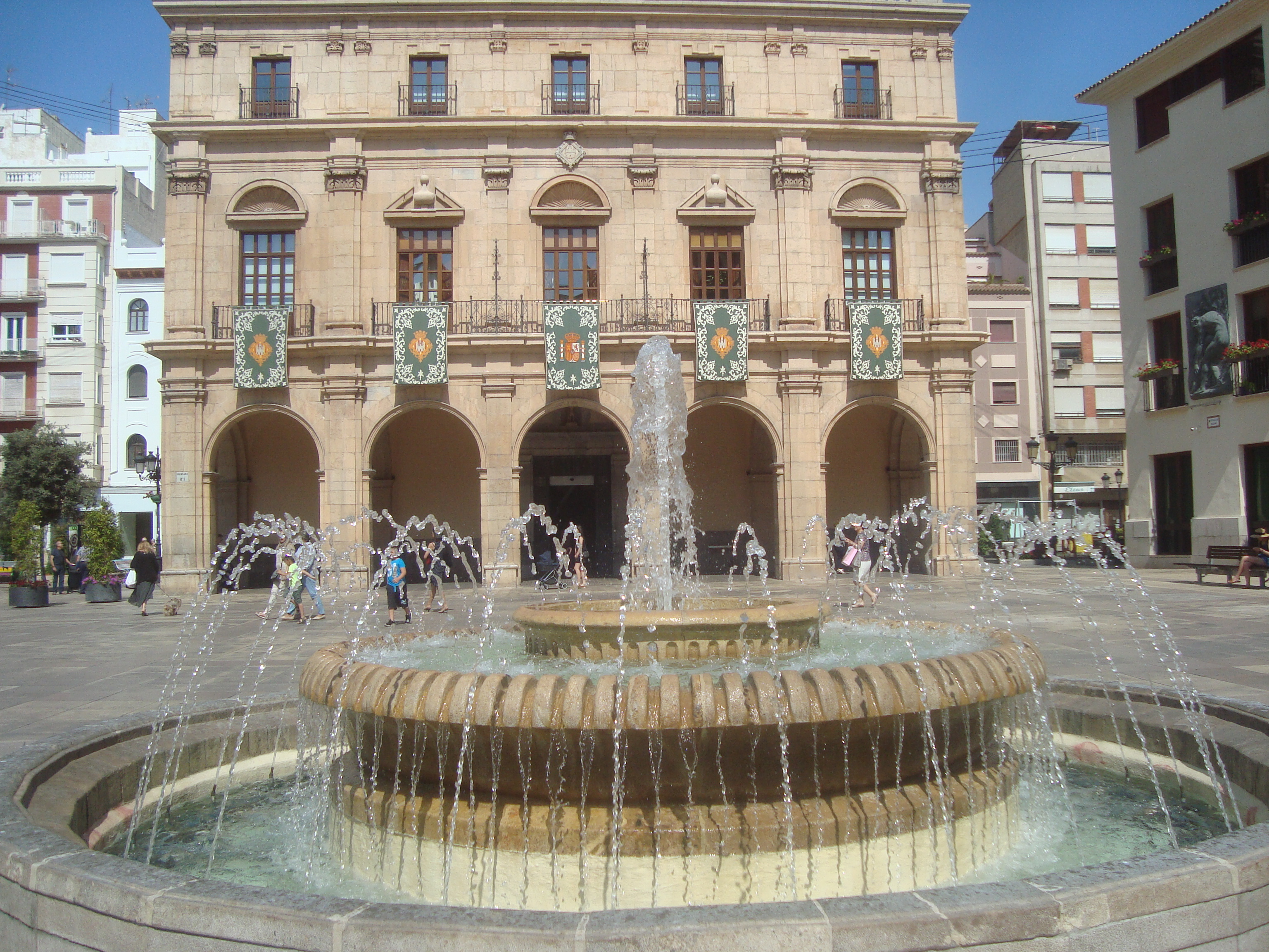 Ajuntament de Castelló de la Plana